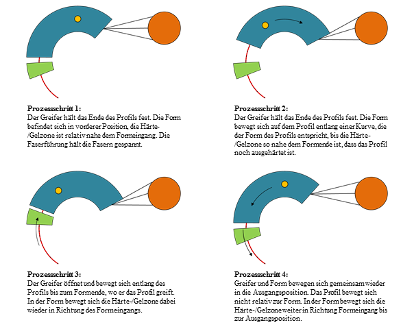 Beschreibt den Prozessablauf der Radiuspultrusion